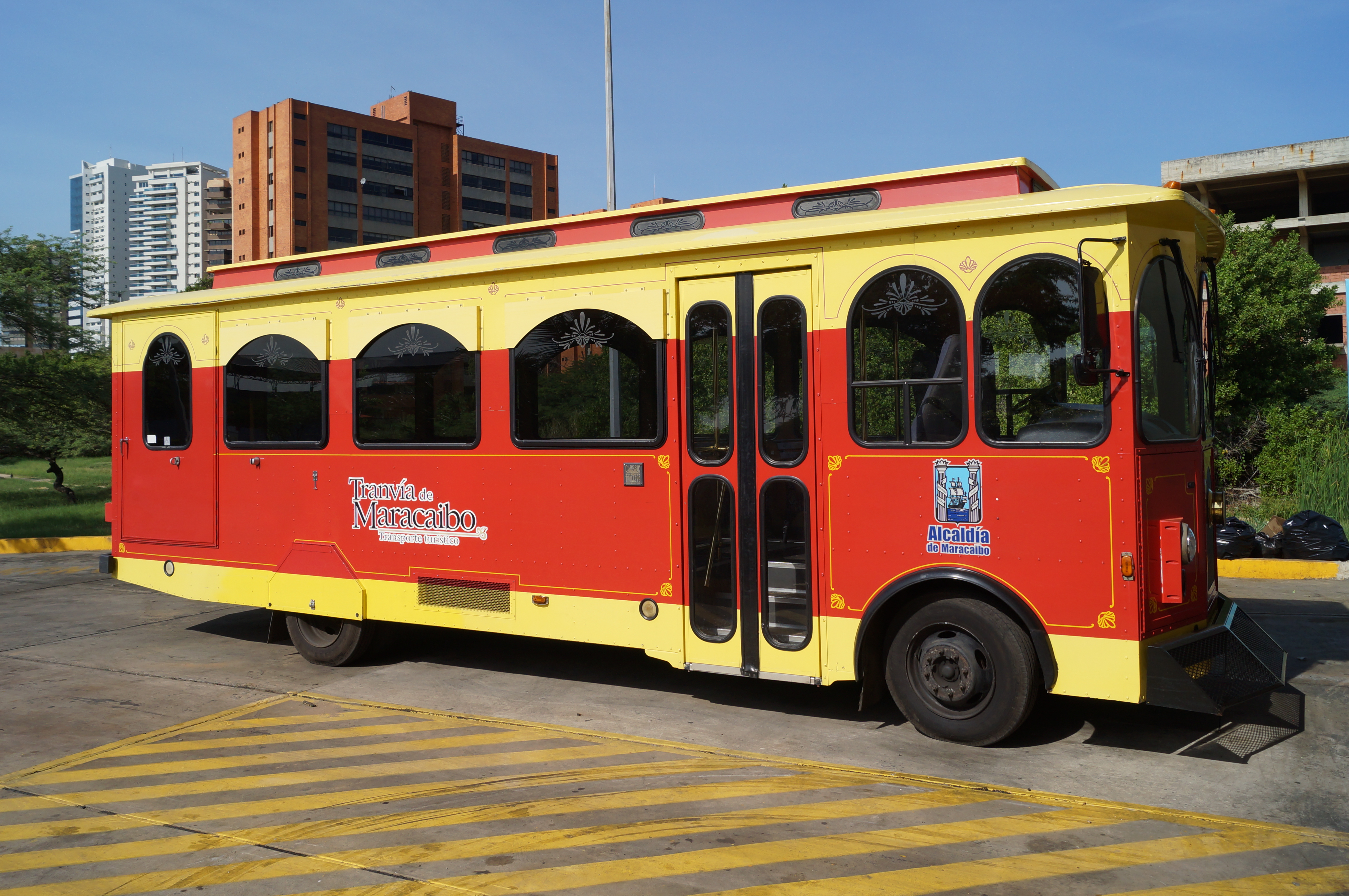 Transporte turístico y cultural de Maracaibo, posee colores brillantes como el rojo y el amarillo, similares a la policromía utilizada en las antiguas viviendas marabinas.